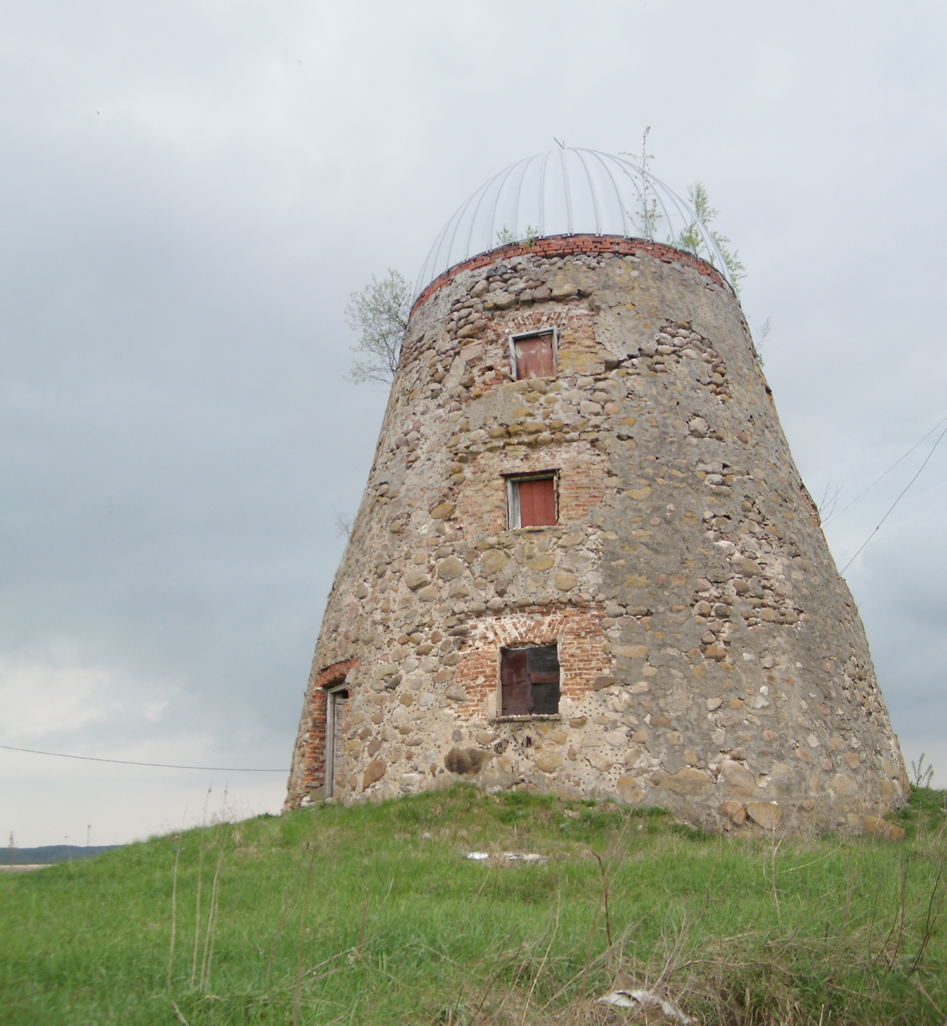 Беларуская (тарашкевіца): Былая сядзіба. в. Тарнова This is a photo of Belarusian heritage monument. Reference number: 413Г000364 ( WLM)